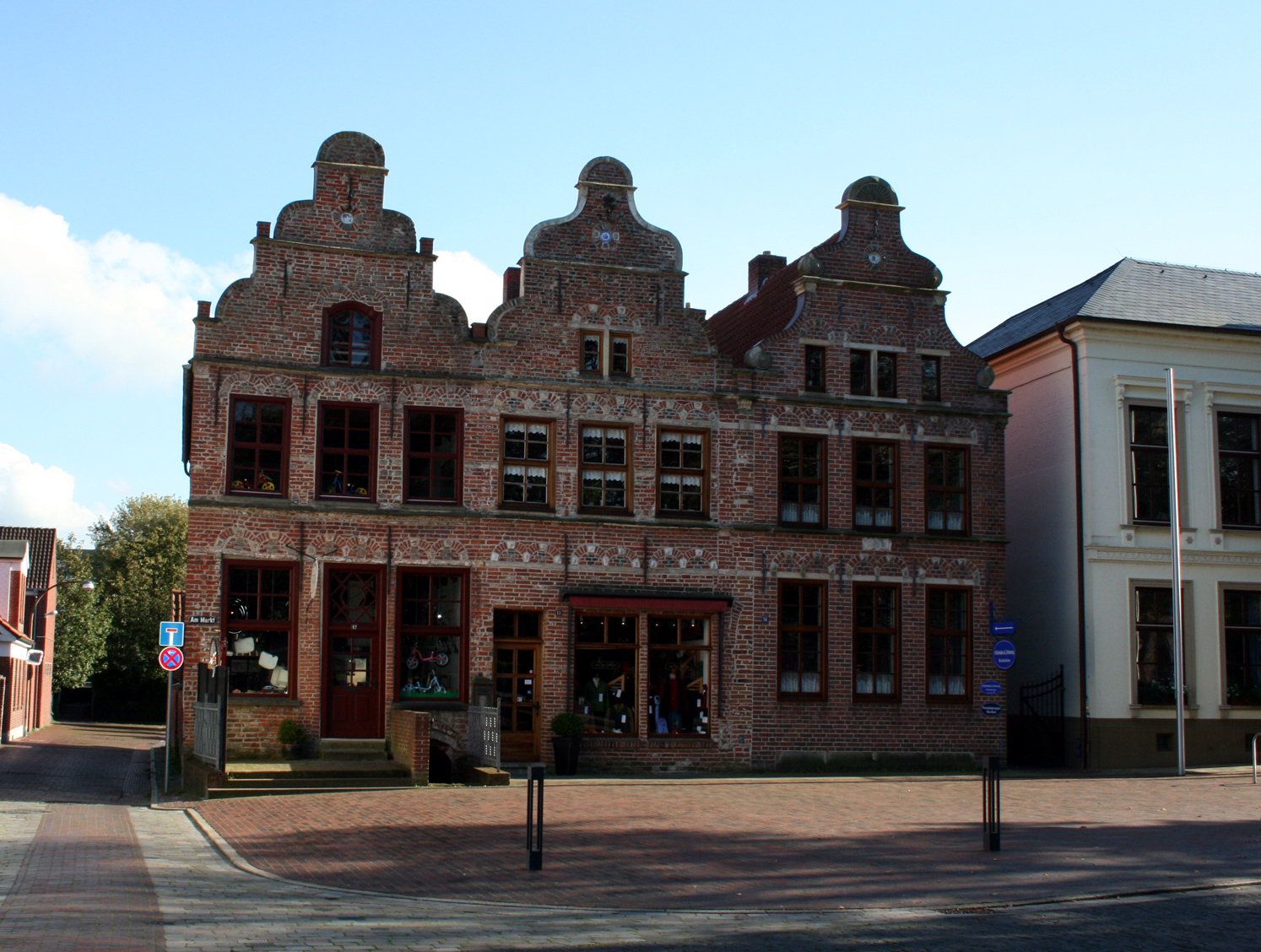 Die "Dree Süsters", ein Häuserensemble am Marktplatz von Norden (Ostfriesland) im Jahr 2007